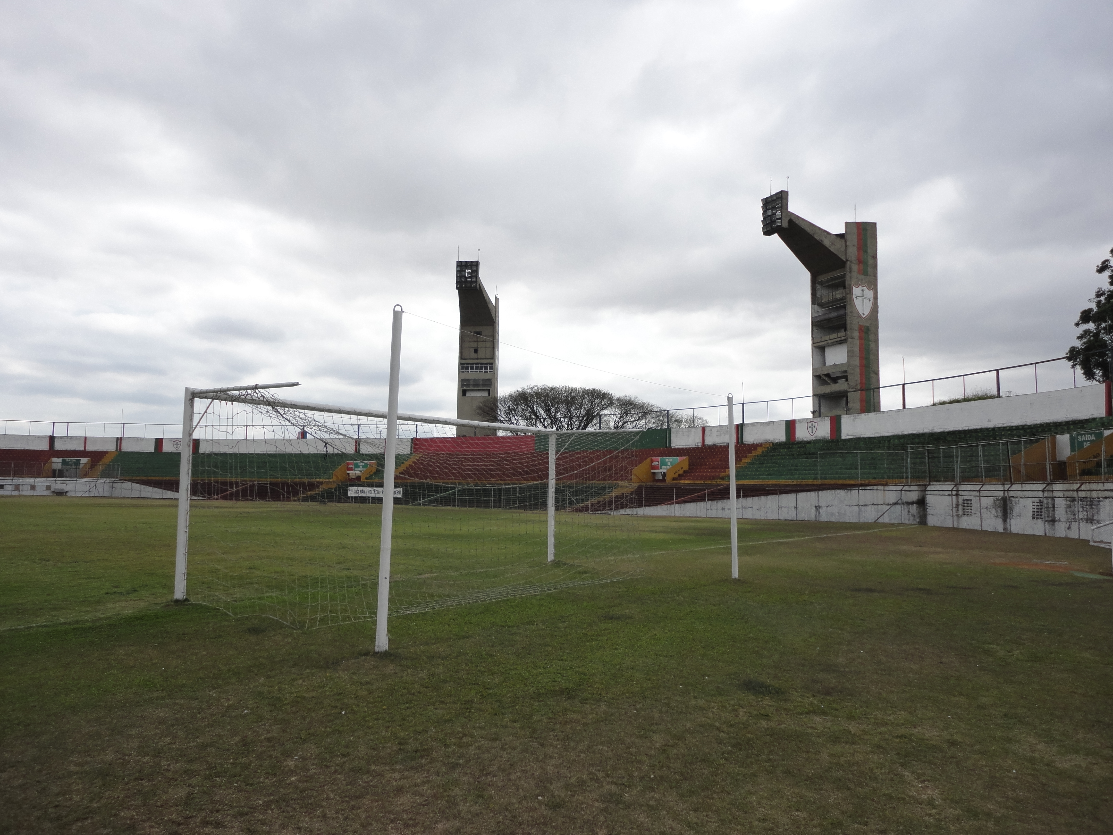 Vista do gramado do Canindé, em São Paulo, Brasil 05